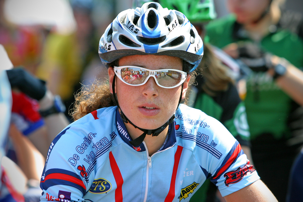 Laura Turpijn bij de start van het Nederlands Kampioenschap MTB 2004 te Zoetermeer